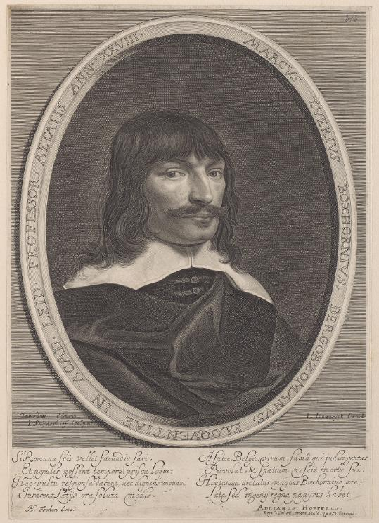 prent van Marcus Boxhorn, bijzondere collecties Universiteitsbibliotheek Leiden